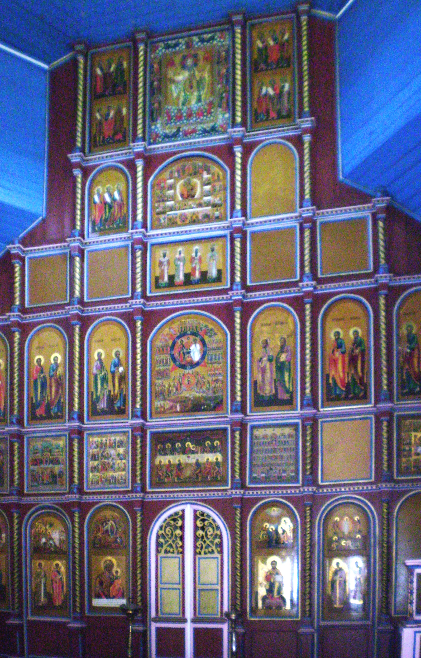 Иконостас Никольской старообрядческой церкви.